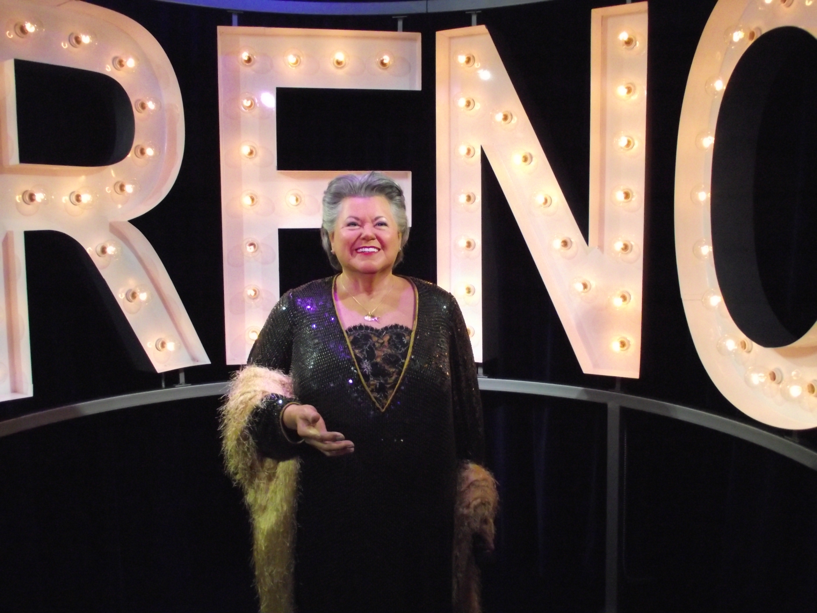 Ginette Reno au Musée Grévin Montréal